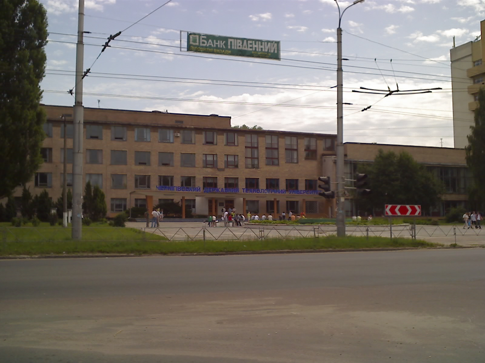 Черниговский государственный технологический университет